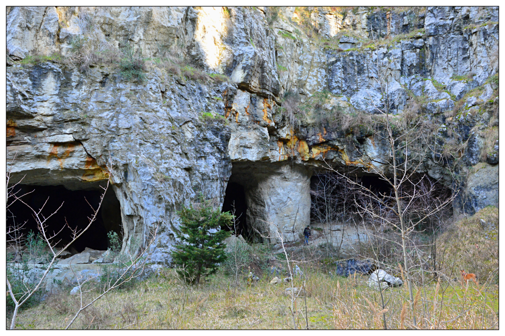 Visuale esterno della vecchia cava di gesso Marana.